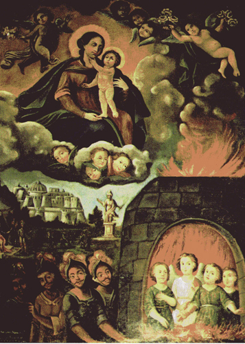 San Giovanni in Fiore - Monastero dell'A-PAtia - Quadro dell'annunciazione